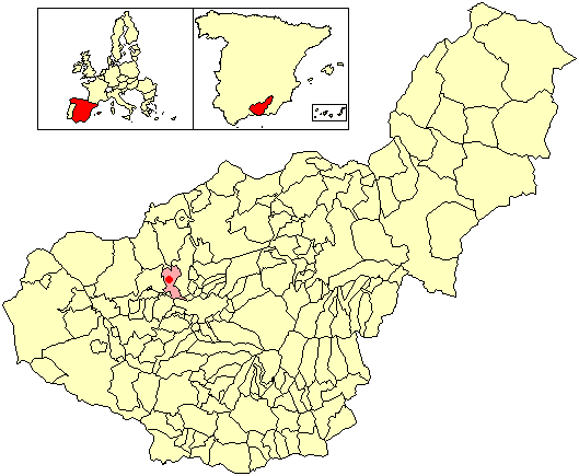 Situación de la localidad de Caparacena (en el municipio de Atarfe) respecto a la provincia de Granada, en España.